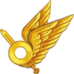 Беретний знак авіації (повітряних сил, армійської, морської)